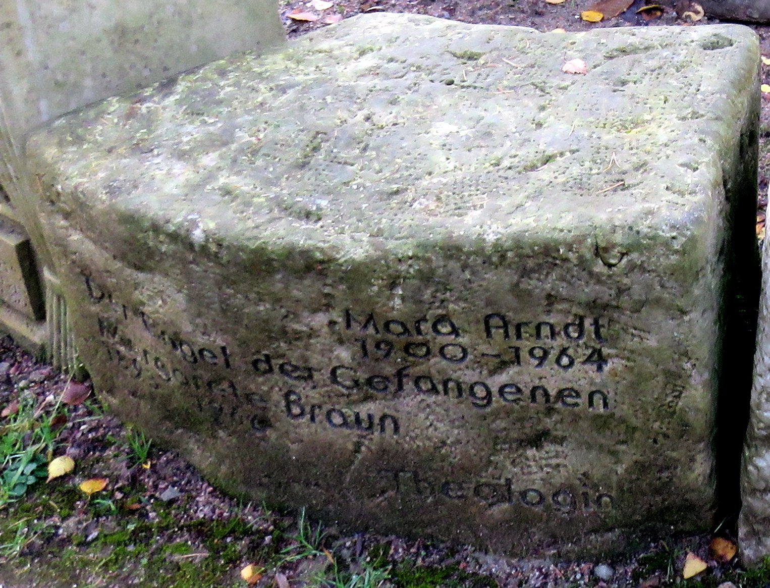 Gedenkstein für die Hamburger Wohltäterin Mara Arndt und die Hamburger Pastorin Margarete Braun in der Erinnerungsspirale im Bereich des Gartens der Frauen auf dem Ohlsdorfer Friedhof in Hamburg-Ohlsdorf.